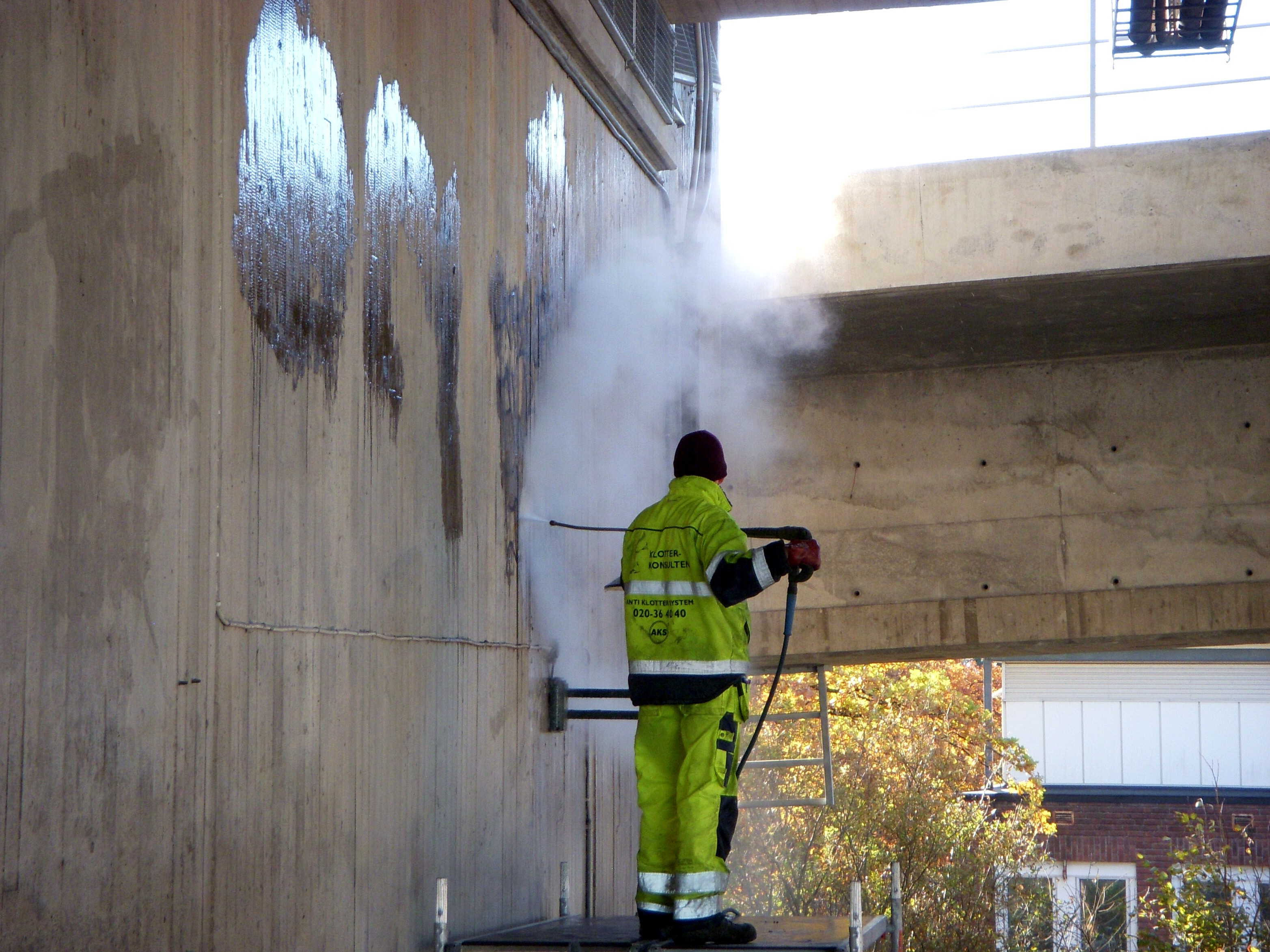 Klottersanering under Gröndalsbron